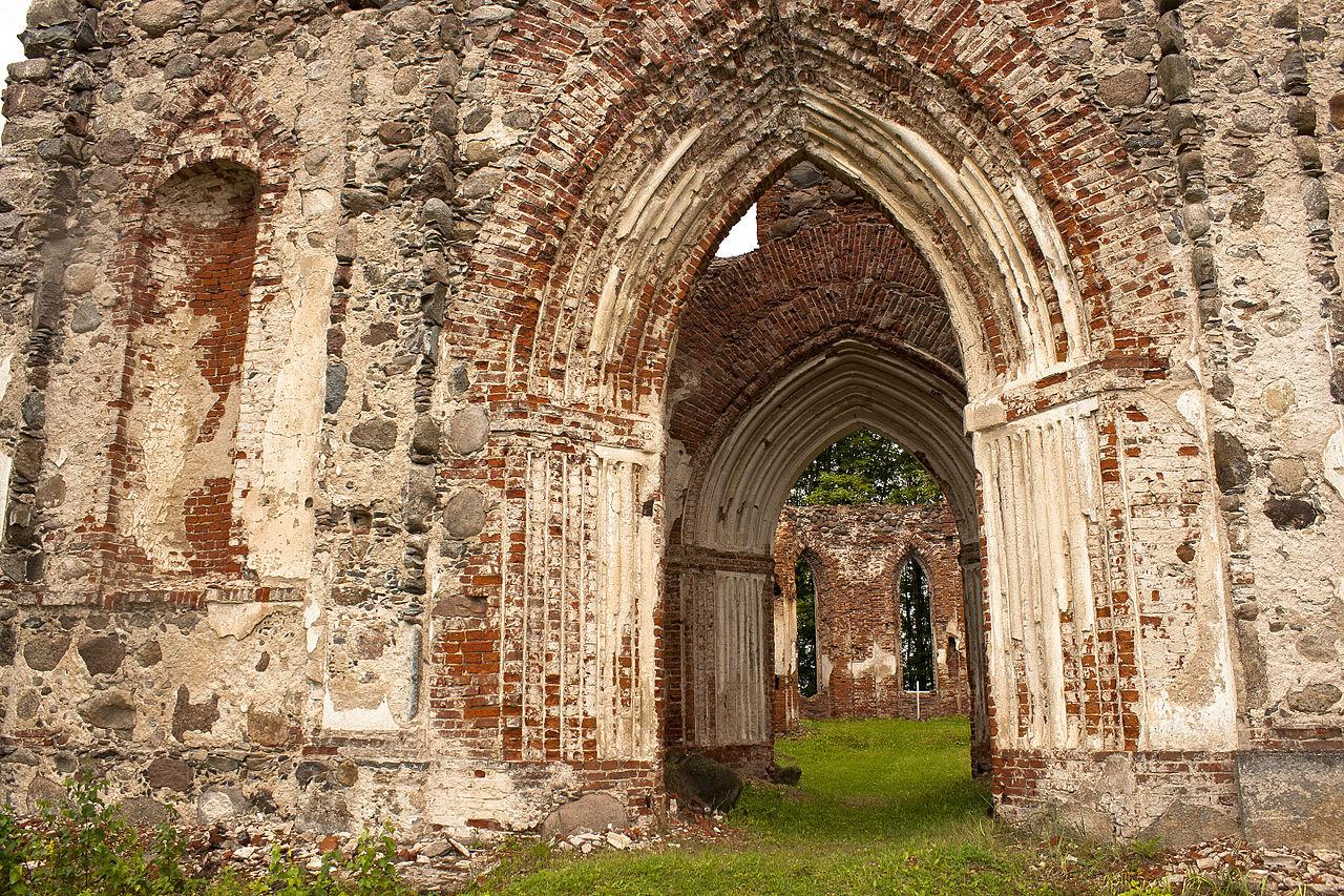 Veckalsnavas baznīcas drupas